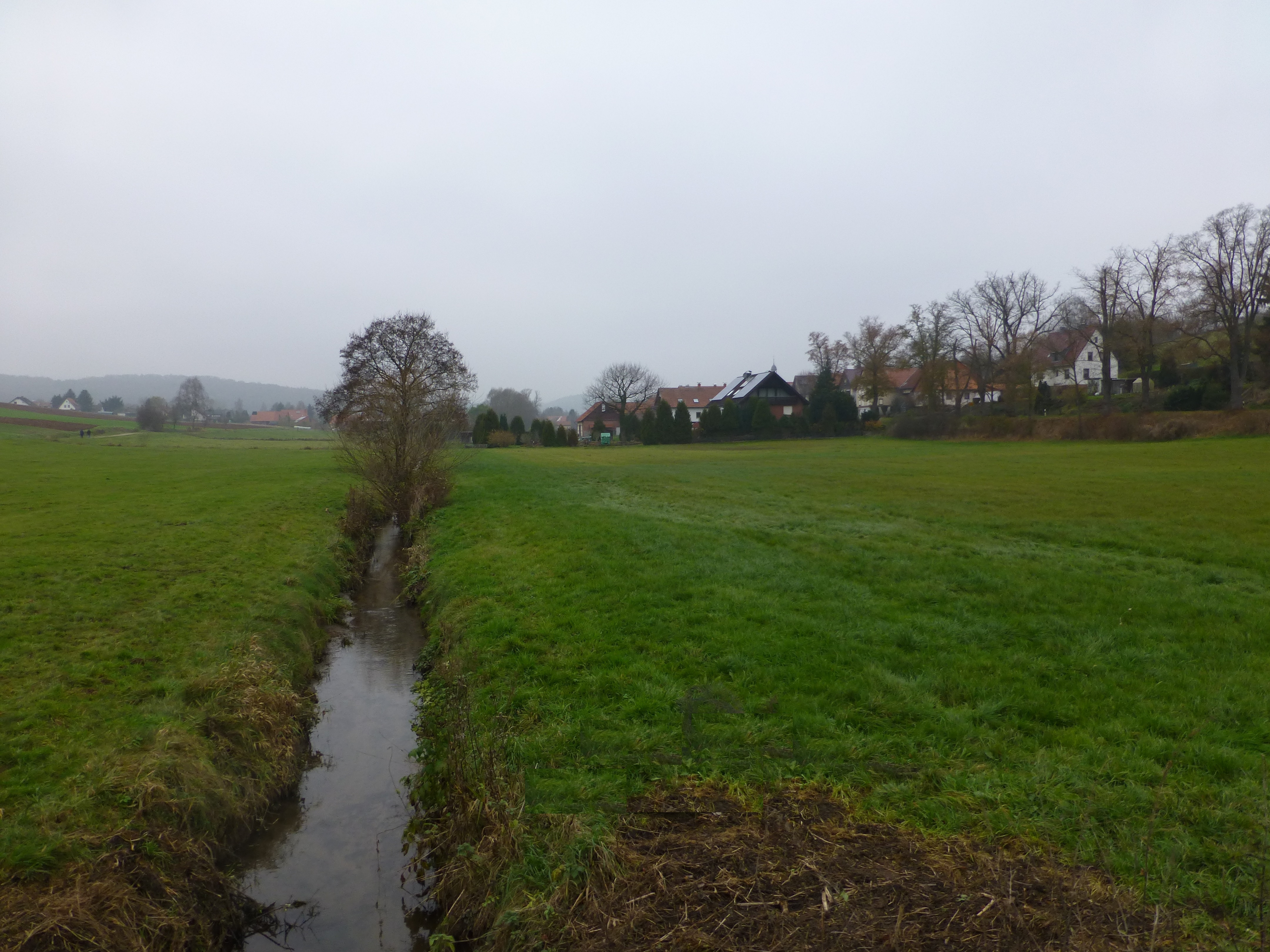 Blick aus östlicher Richtung nach Landolfshausen